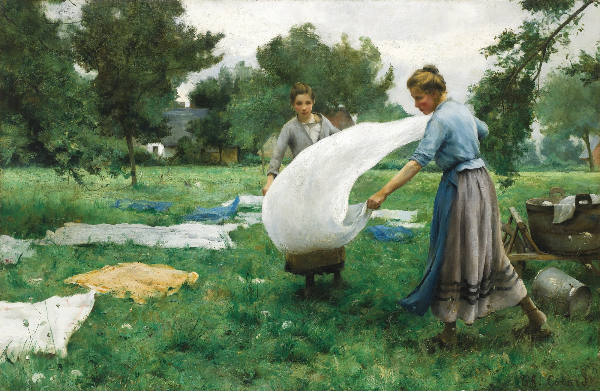 Paris, Salon, 1910, no. 526